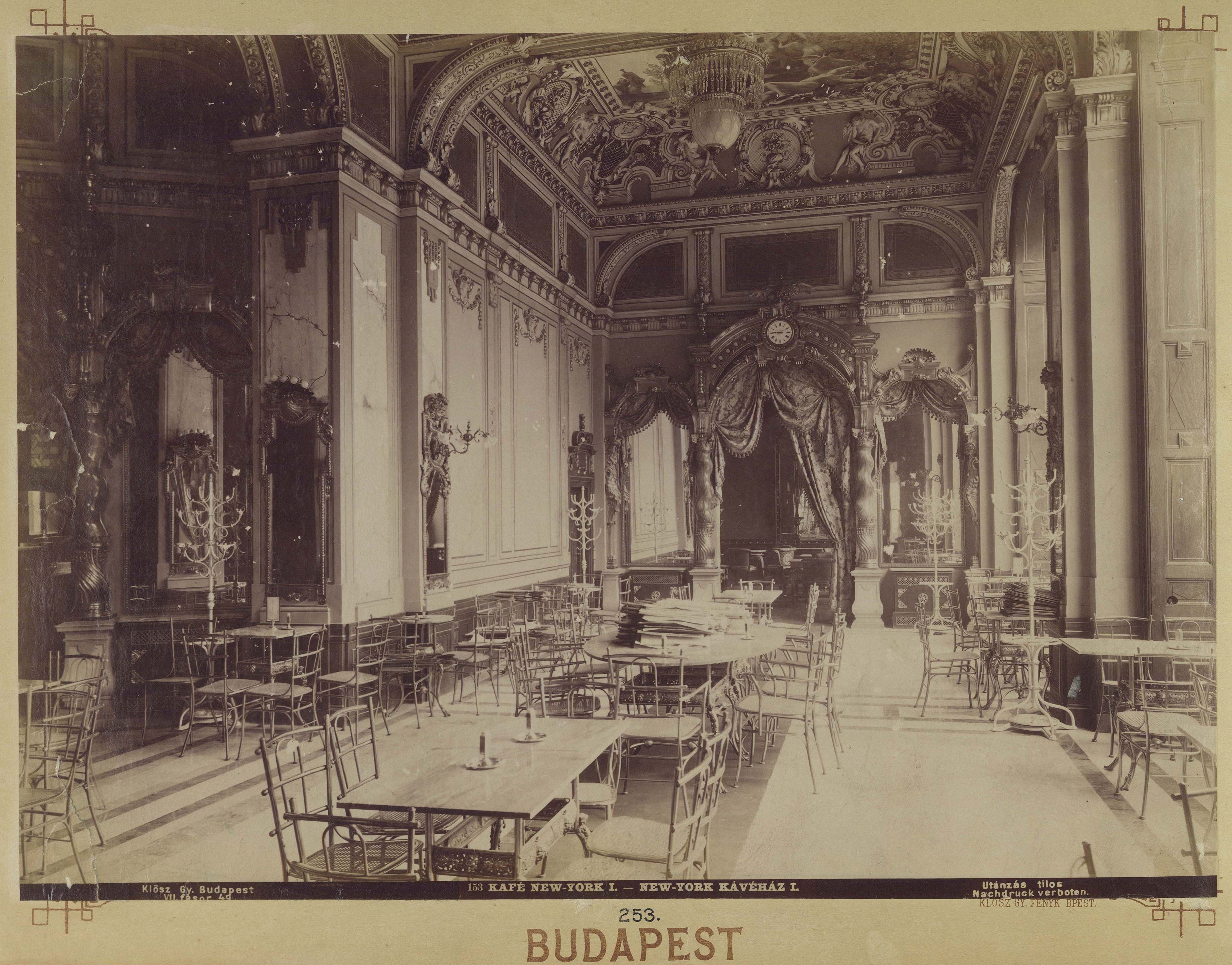 New York Kávéház. A felvétel 1894 körül készült. A kép forrását kérjük így adja meg: Fortepan / Budapest Főváros Levéltára. Levéltári jelzet: HU.BFL.XV.19.d.1.08.059 Location: Hungary, Budapest VII.